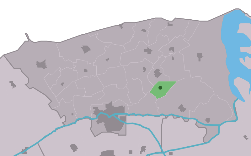 Kaartsje fan himrik fan Jouswier